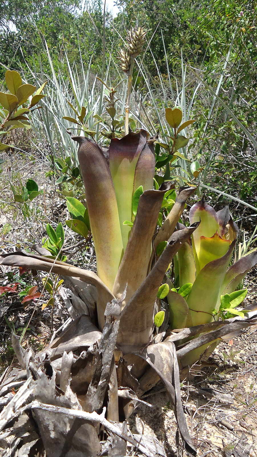 Hohenbergia littoralis L.B.Sm.